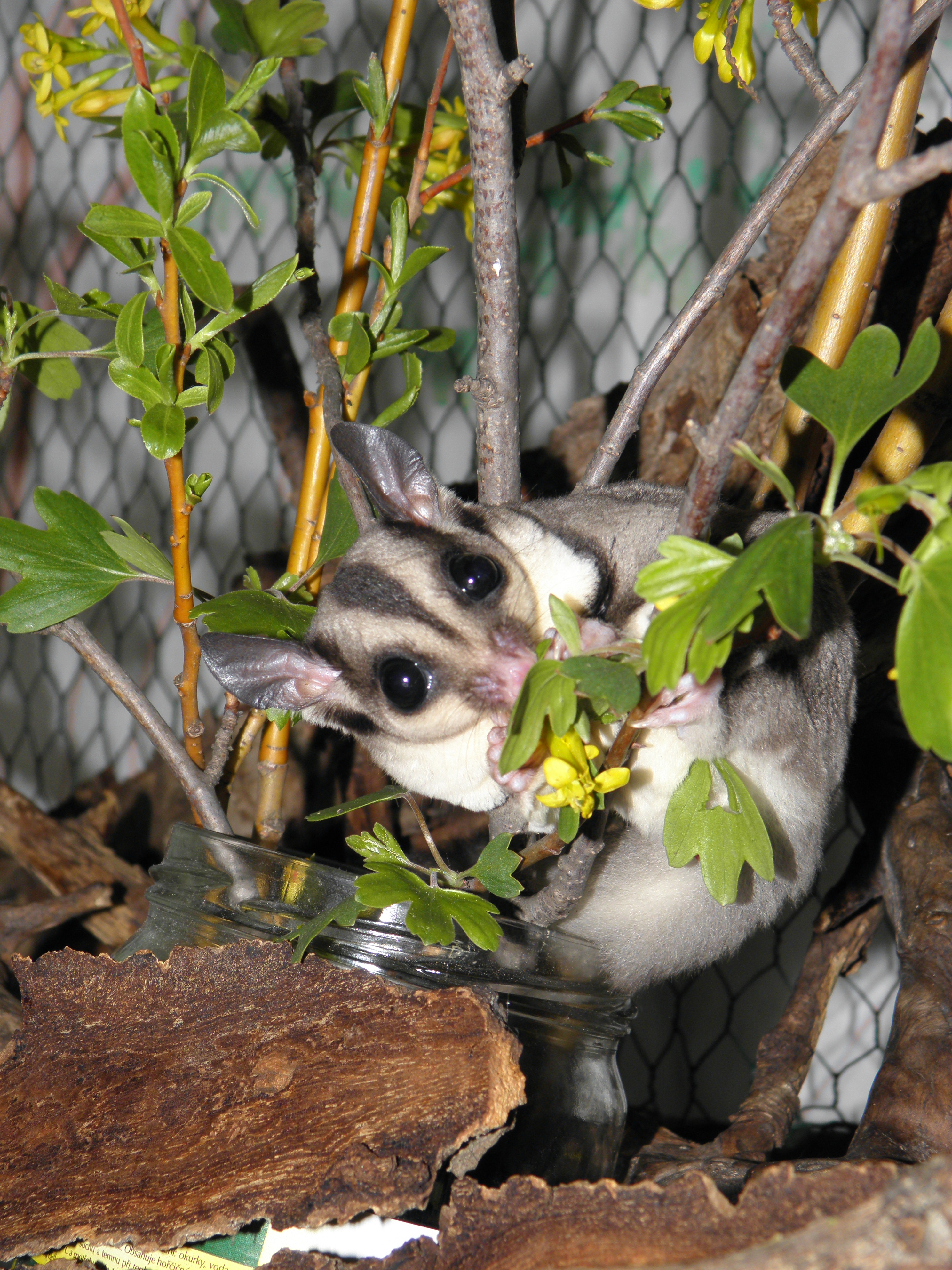 Pravidelné vkládání čerstvých větví listnatých stromů do voliéry poskytuje vakoveverkám nové podněty, které jim obohacují jinak nudné prostředí voliéry a poskytuje prostor pro značkování nových předmětů.